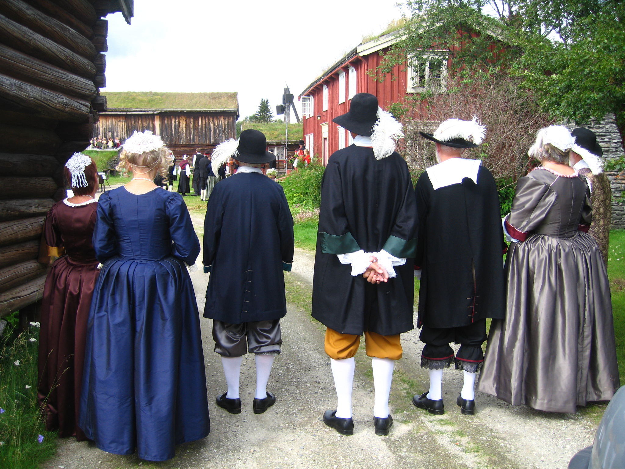 Balldansere paa bygdatur